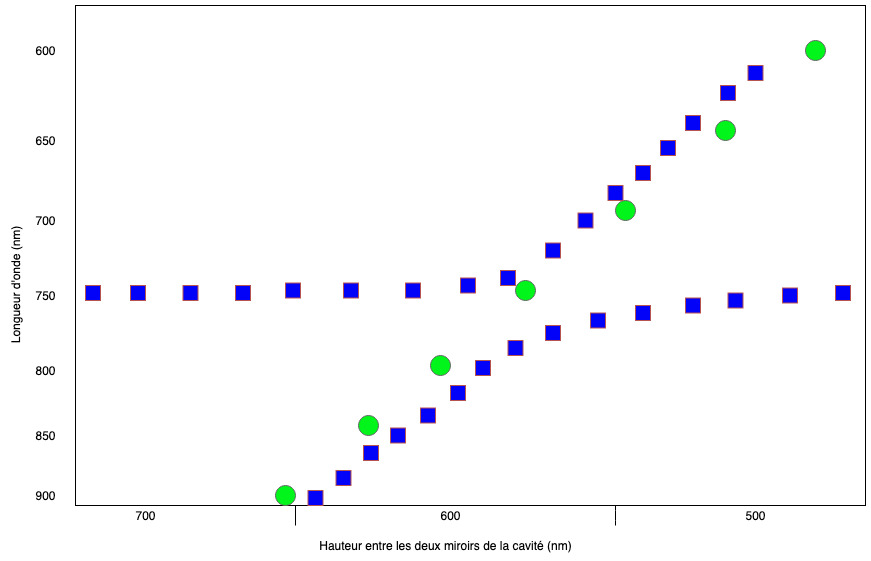 Schéma d'intrication quantique de Chlorobaculum tepidum, illustrant les résultats tels qu'obtenus par David Coles, 2018 ( Ronds vert: trajectoire nominale de la lumière normalement attendue chez des organismes semblables en interaction avec la lumière. Carrés bleus: trajectoire effectivement observée expérimentalement par Coles (2018).